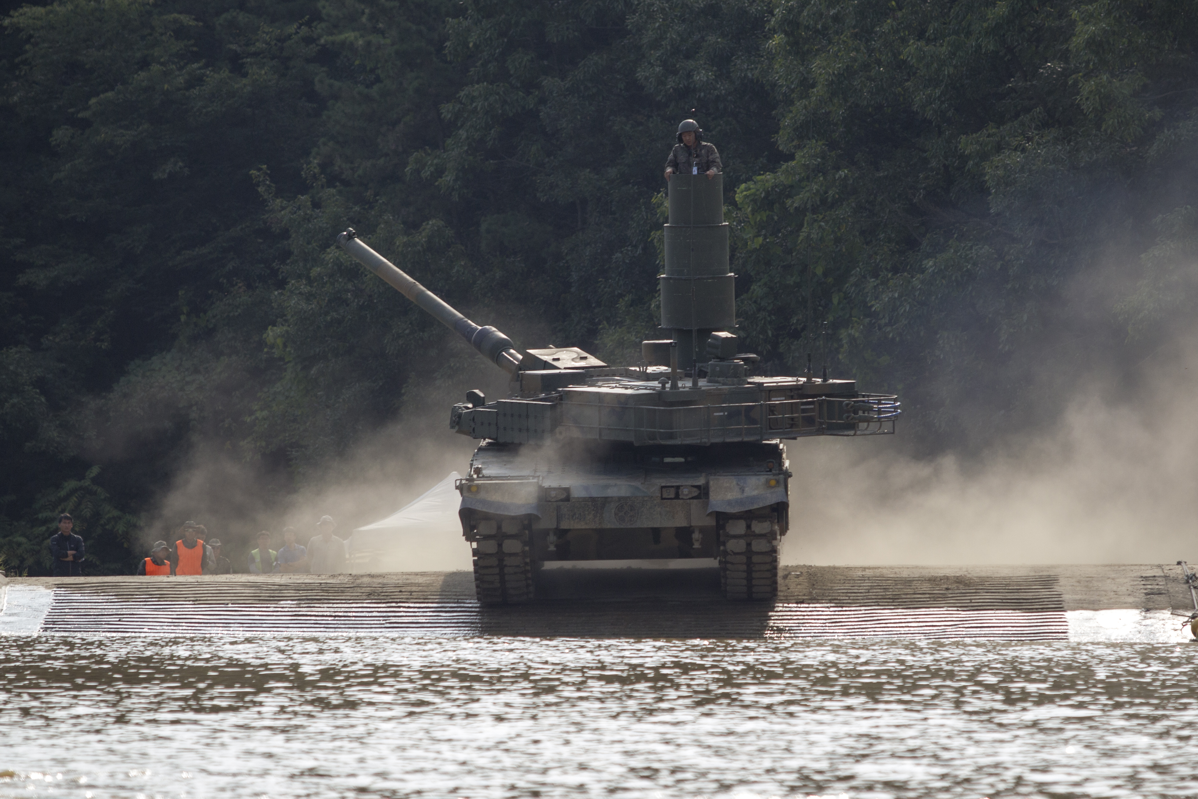 사진 - 정승익 육군 블로그 사진작가